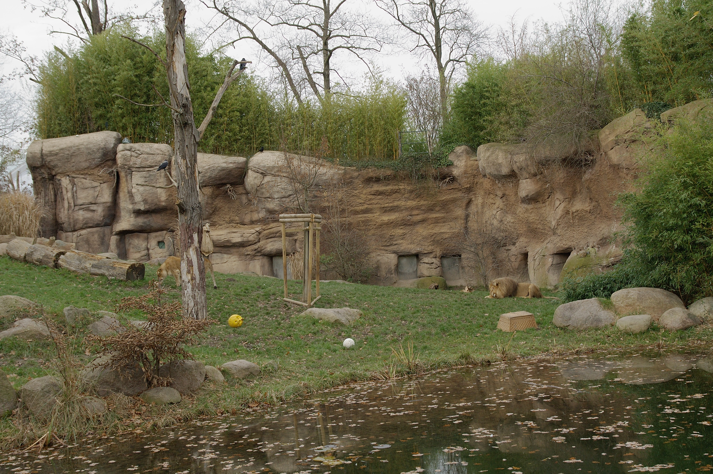 Löwensavanne „Makasi Simba“ im Zoo Leipzig.